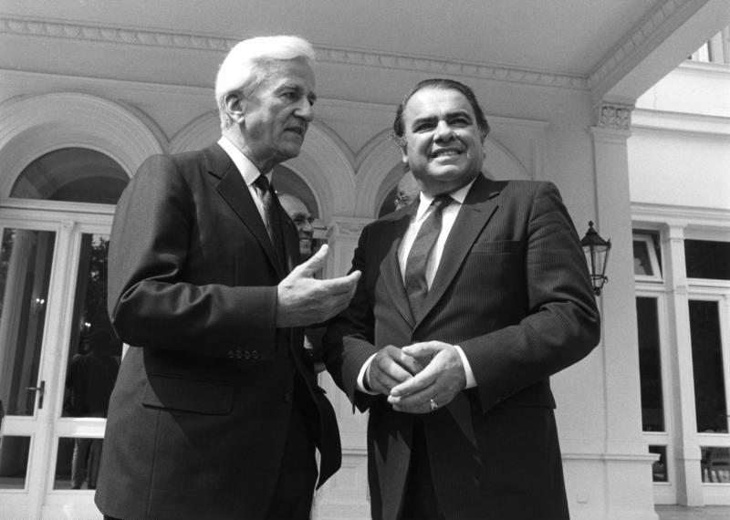 Bonn, 22. Juni 1987 Vom 20. bis 25. Juni 1987 statteten der Präsident der Republik Uruquay, Dr. Julio Maria Sanguinetti, und Frau Prof. Maria Canessa de Sanguinetti der Bundesrepublik Deutschland einen Besuch ab. Sie wurden von Außenminister Enrique Iglesias, Wirtschfts- und Finanzminister Ricardo Zerbino und der Ministerin für Erziehung und Kultur, Dr. Adela Reta, begleitet. Während seines Aufenthaltes in Bonn führte Präsident Sanguinetti politische Gespräche mit Bundespräsident Richard von Weizsäcker, Bundeskanzler Helmut Kohl, dem Bundesminister des Auswärtigen, Hans-Dietrich Genscher, dem Bundesminister für wirtschaftliche Zusammenarbeit, Hans Klein, und weiteren Mitgliedern der Bundesregierung. Er traf auch mit Vertretern der politischen Stiftungen und der deutschen Wirtschaft zusammen. Am 22. Juni unterzeichnen Bundesaußenminister Hans-Dietrich Genscher und die uruquayische Ministerin Reta ein deutsch-uruquayisches Kulturabkommen. Außer Bonn besuchten die Gäste aus Uruquay Hamburg, Köln und München. Im Bild: Bundespräsident Richard von Weizsäcker (l.) im Gespräch mit dem uruquayischen Außenminister Enrique Iglesias vor der Villa Hammerschmidt